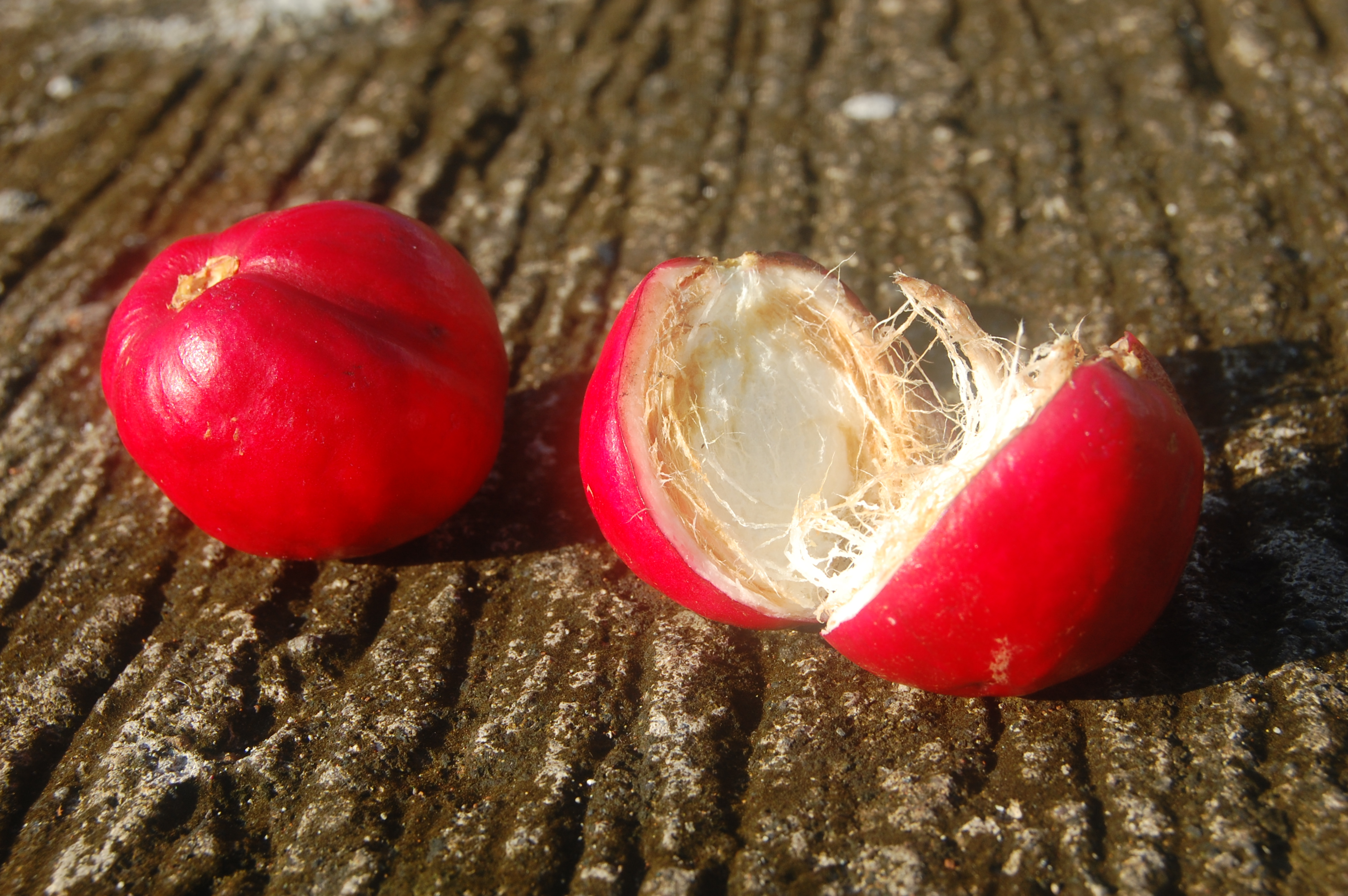 Pohon Mahkota Dewa (Phaleria macrocarpa) dikenal sebagai salah satu tanaman obat di Indonesia. Asalnya dari Papua/Irian Jaya.